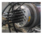 vue des torons